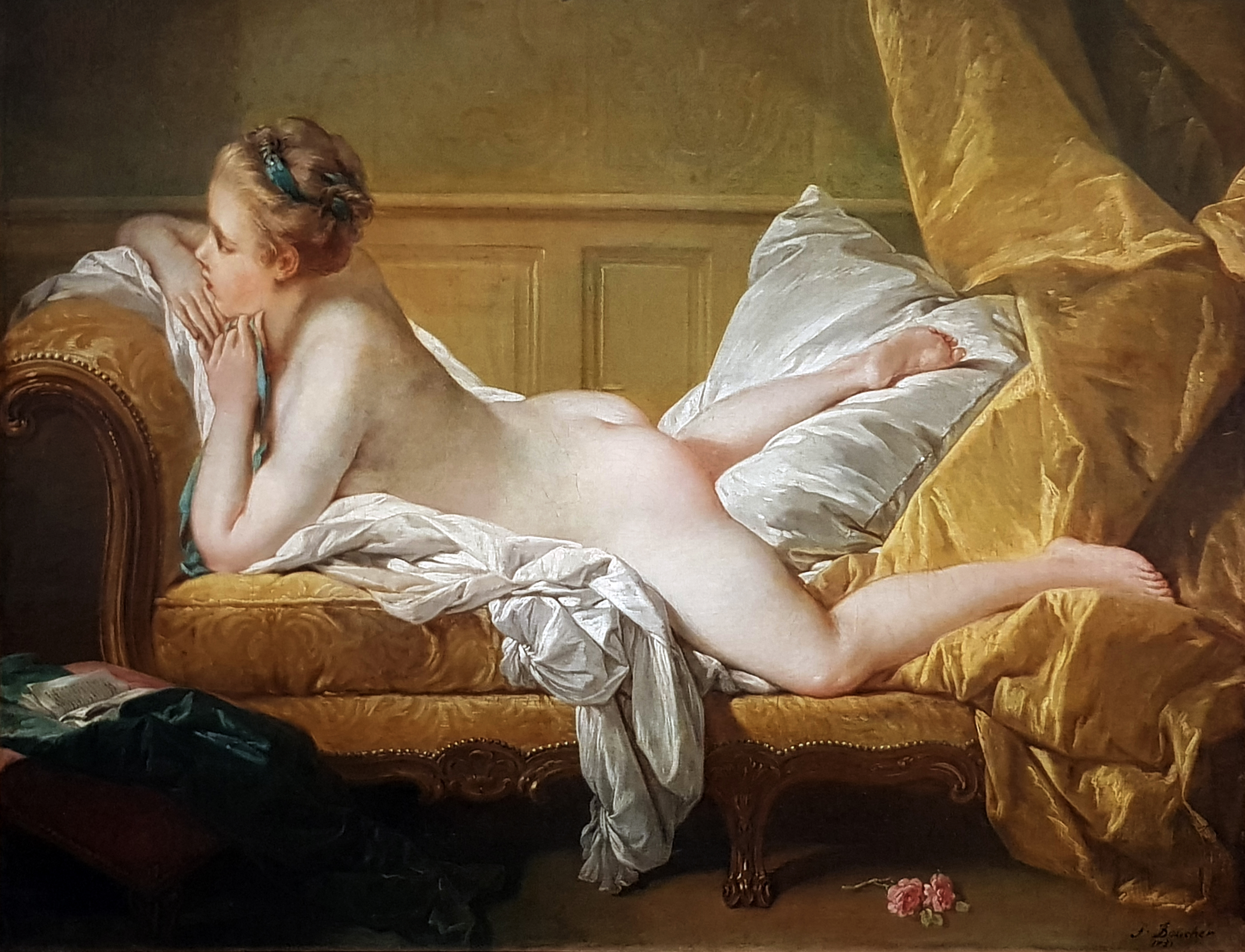 Vermutlich Portrait von Louise O'Murphy (21 October 1737 – 11 December 1814), Mätresse von König Louis XV von Frankreich.